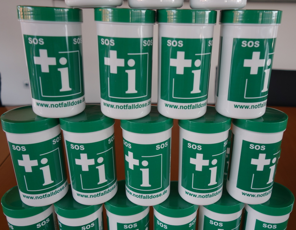 Präsentation der SOS Notfalldosen in Holzgerlingen